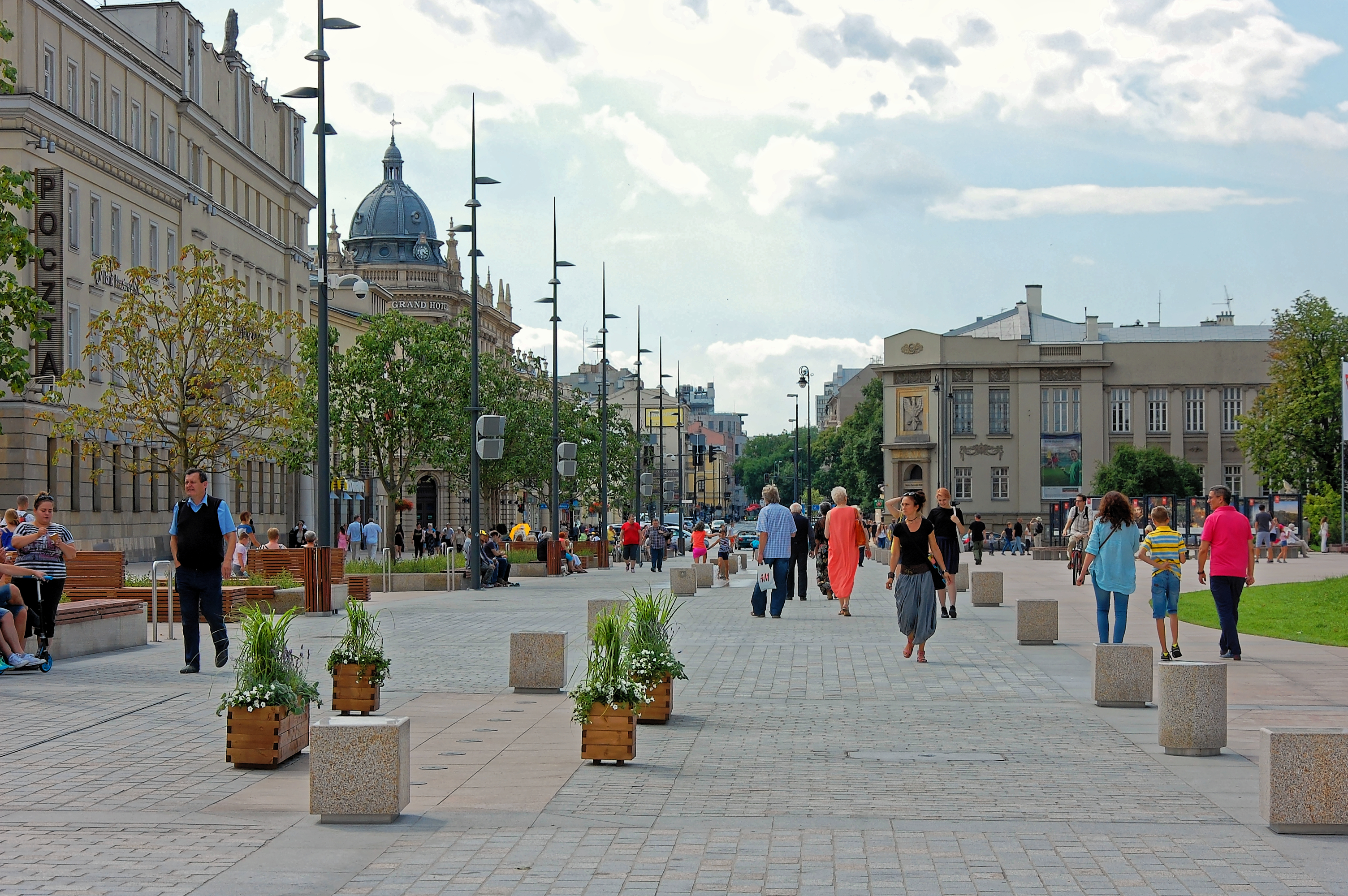 Plac Litewski w Lublinie